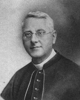 Josef Foltynovský (1880 - 1936), Český římskokatolický kněz.